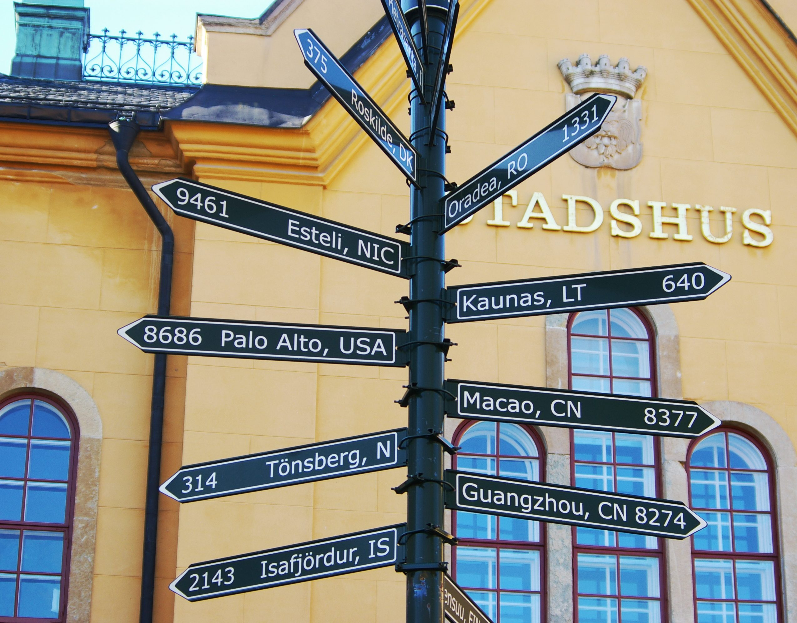 Skylt utanför Linköpings stadshus med stadens vänorter och avstånden till dem. Roskilde i Danmark, som finns med på bilden, är inte längre en vänort till Linköping.